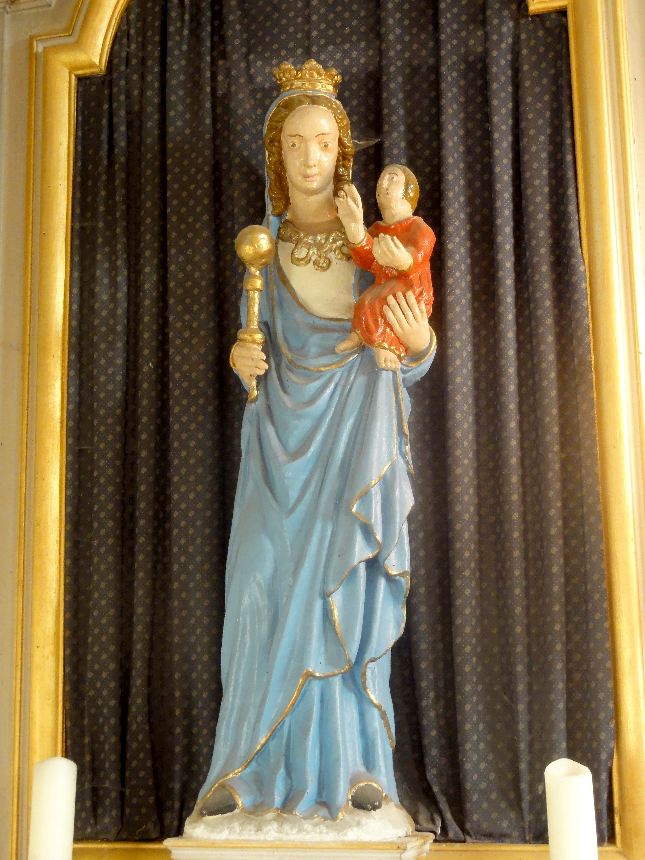 Vierge à l'Enfant en pierre, XVIIIe s., repeinte au XXe s.